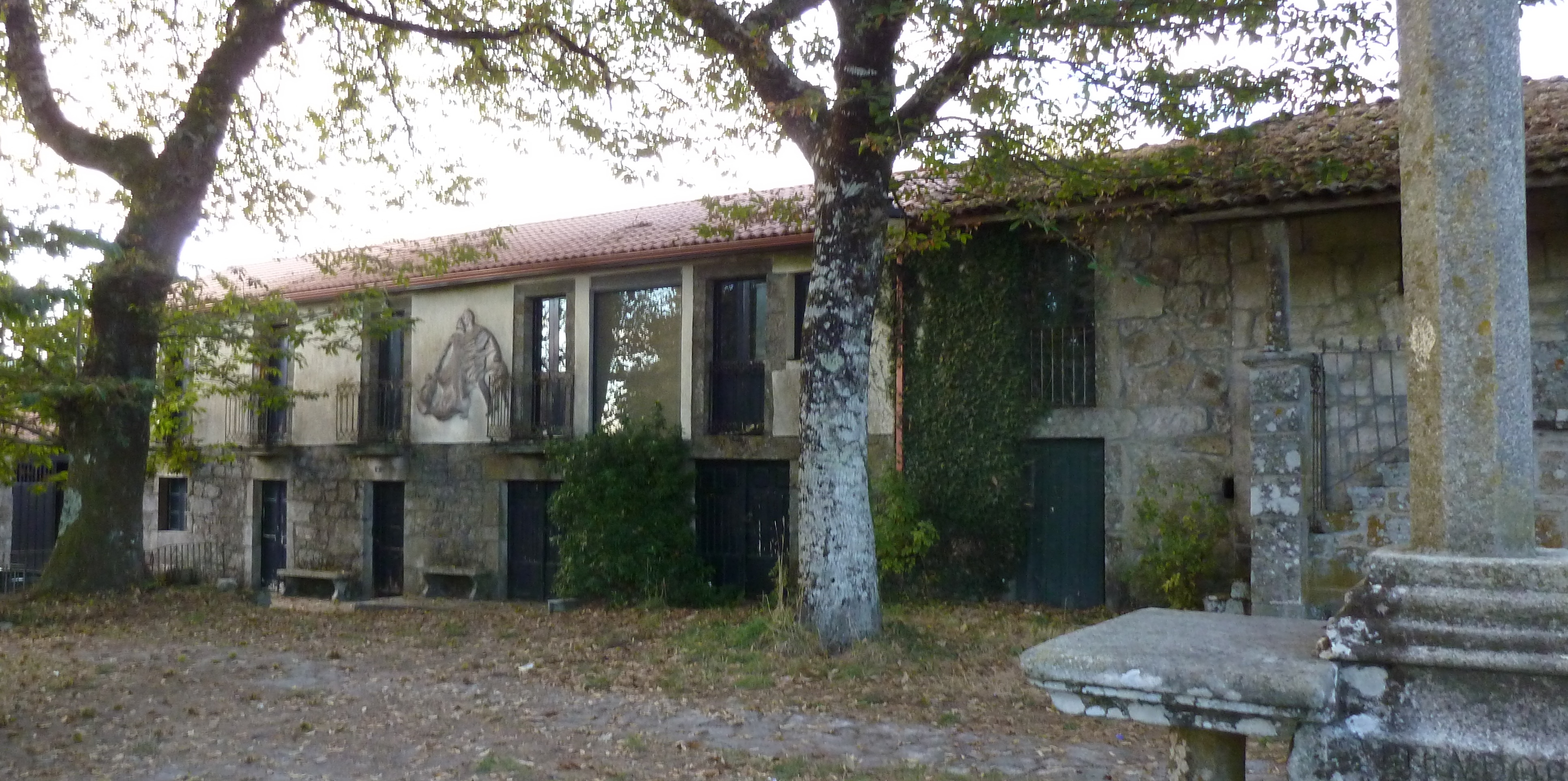 Casa onde naceu o escultor Manuel García Buciños